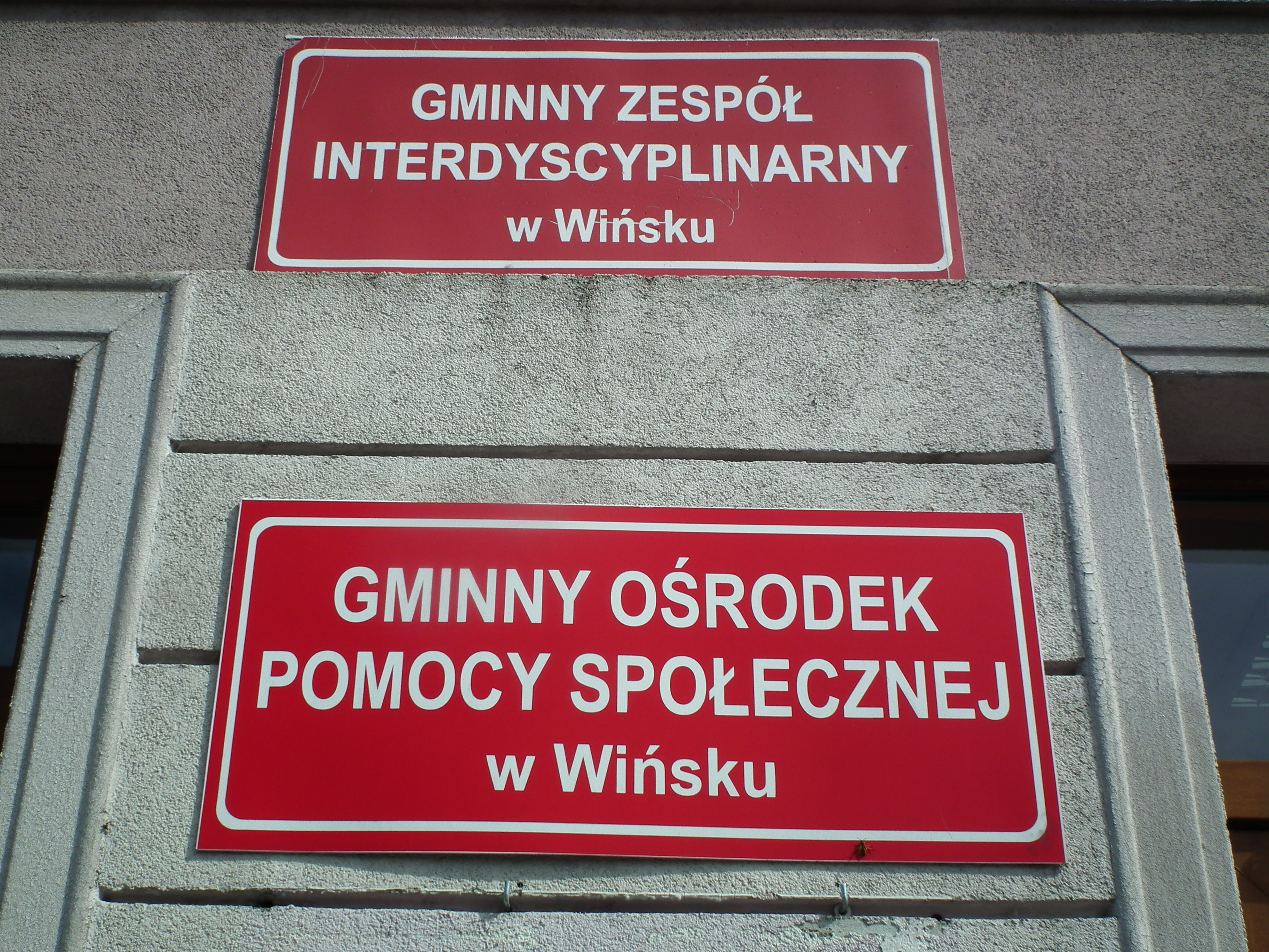 GOPS w Wińsku.